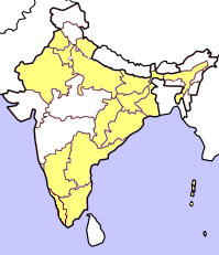 Kartan bygger på resultatet från valet till Lok Sabha april/maj 2004. Gult betyder att partiet lanserat en eller flera kandidater i delstaten, dock utan att vinna mandat. Orange betyder att partiet vunnit mandat från delstaten. Rött betyder att partiet vunnit minst 25% av mandaten från den delstaten och mörkrött 50% eller mer. Kartan tar inte hänsyn till avhopp, partifusioner och fyllnadsval under den ordinarie mandatperiodens gång. Gjord av Soman.